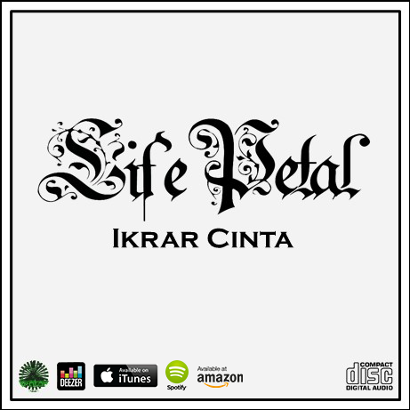 Album Tunggal (Singles) - Ikrar CInta